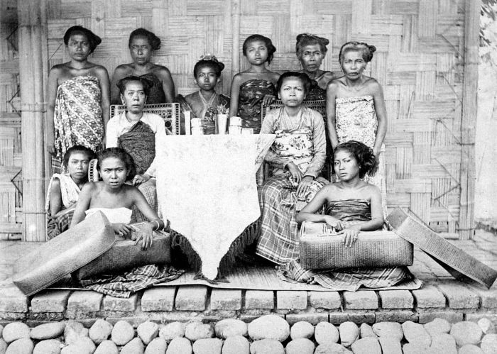 Repronegatief. Vrouwelijke familieleden van de vorst van Lombok